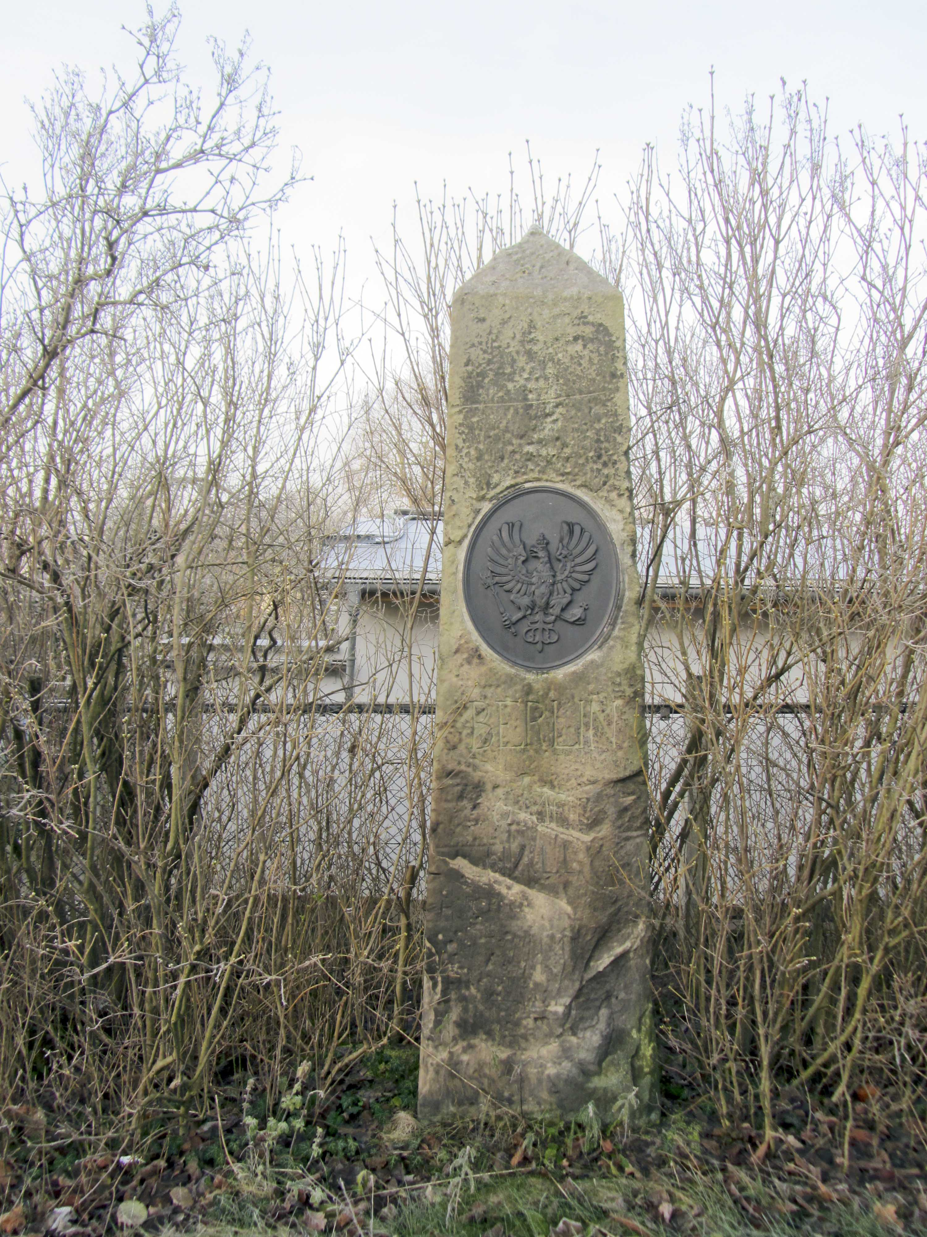 Preußischer Ganzmeilenobelisk (0929) an der L 182, Merseburger Straße in Weißenfels